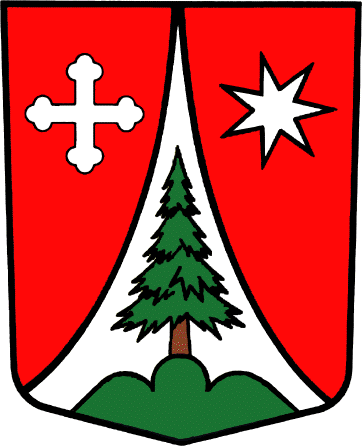 Wappen von Salvan Kanton Wallis Schweiz